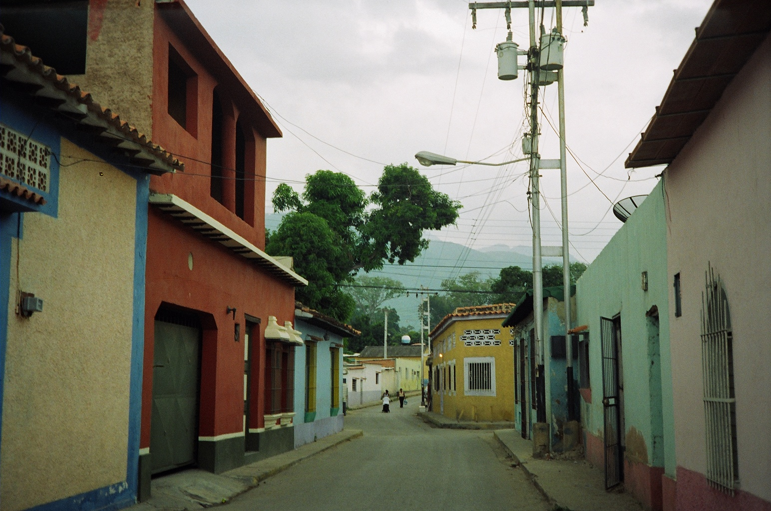 Street in Puerto Columbia, Choroni, Venezuela